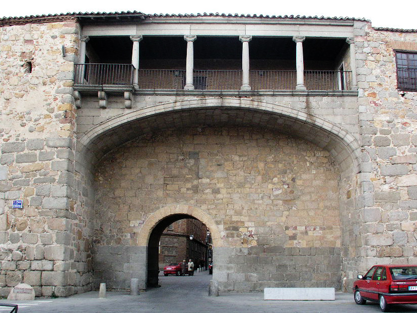 Puerta del Rastro, Ávila de los Caballeros, Spain.